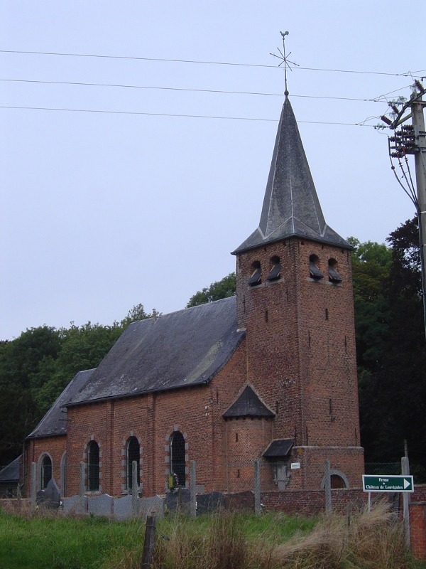 Église Sainte-Radegonde à Louvignies Elle daterait du XVIè siècle, la tour aurait été construite en 1738.